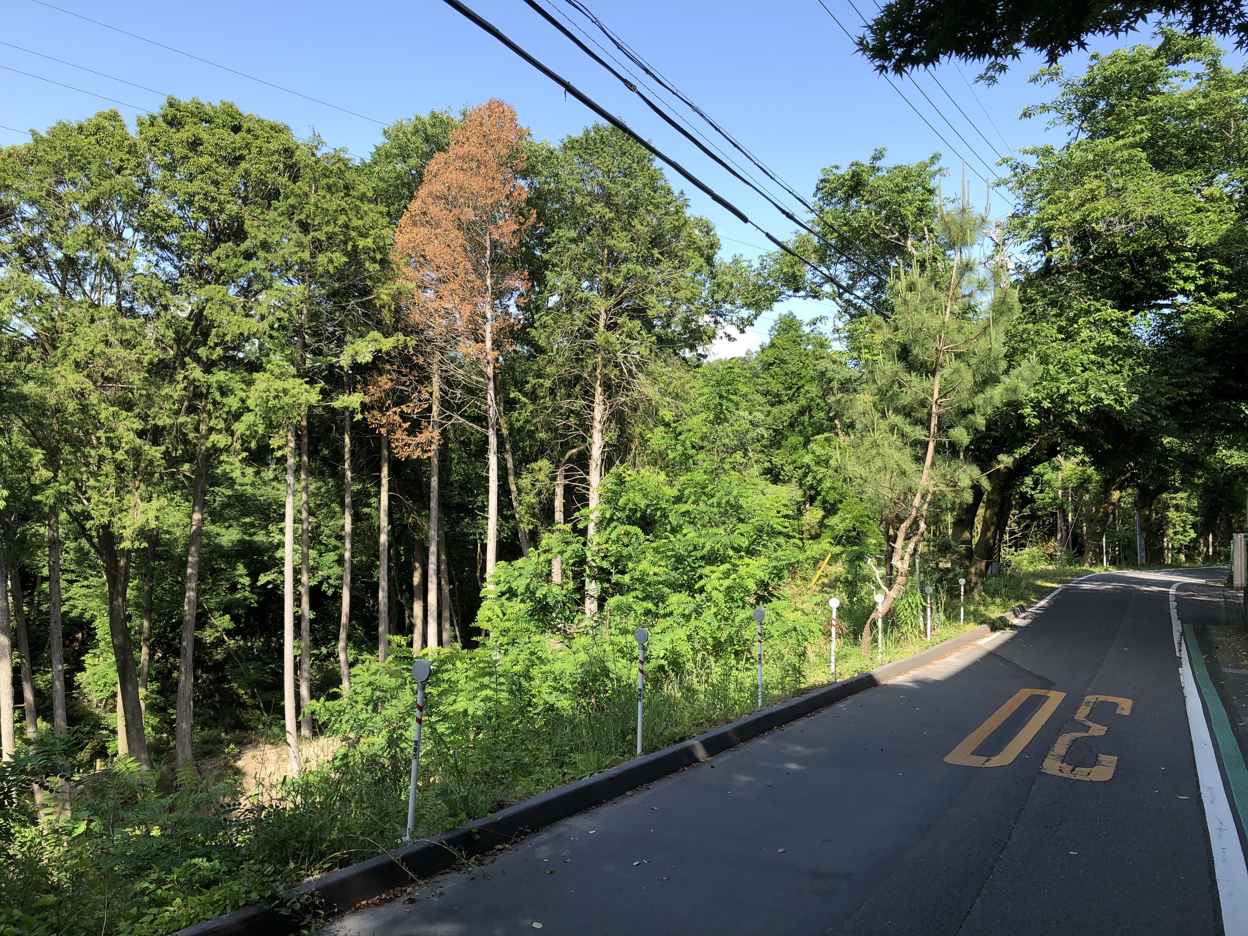 岡崎市丹坂町の森林。道路の右側は岡崎市立恵田小学校の敷地。